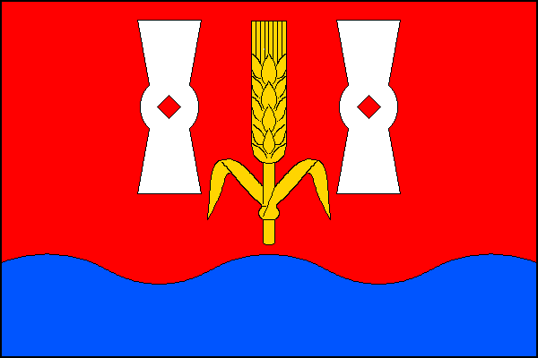 vlajka, Sudoměřice u Tábora, okres Tábor